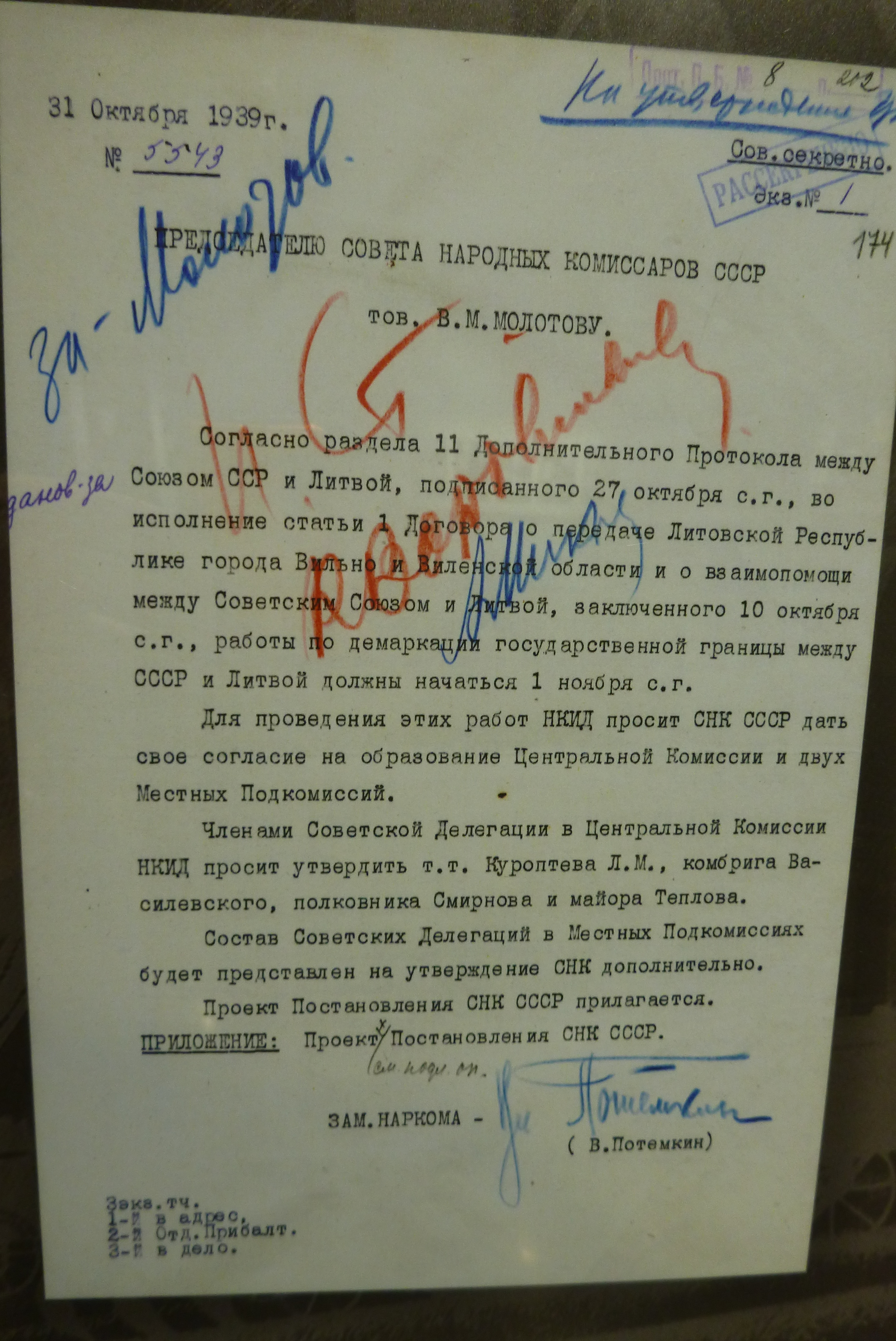 Докладная записка В.П. Потемкина В.М. Молотову о создании комиссии для работы по вопросу демаркации государственной границы между СССР и Литвой, 31 октября 1939 года. На выставке в Ельцин-центре